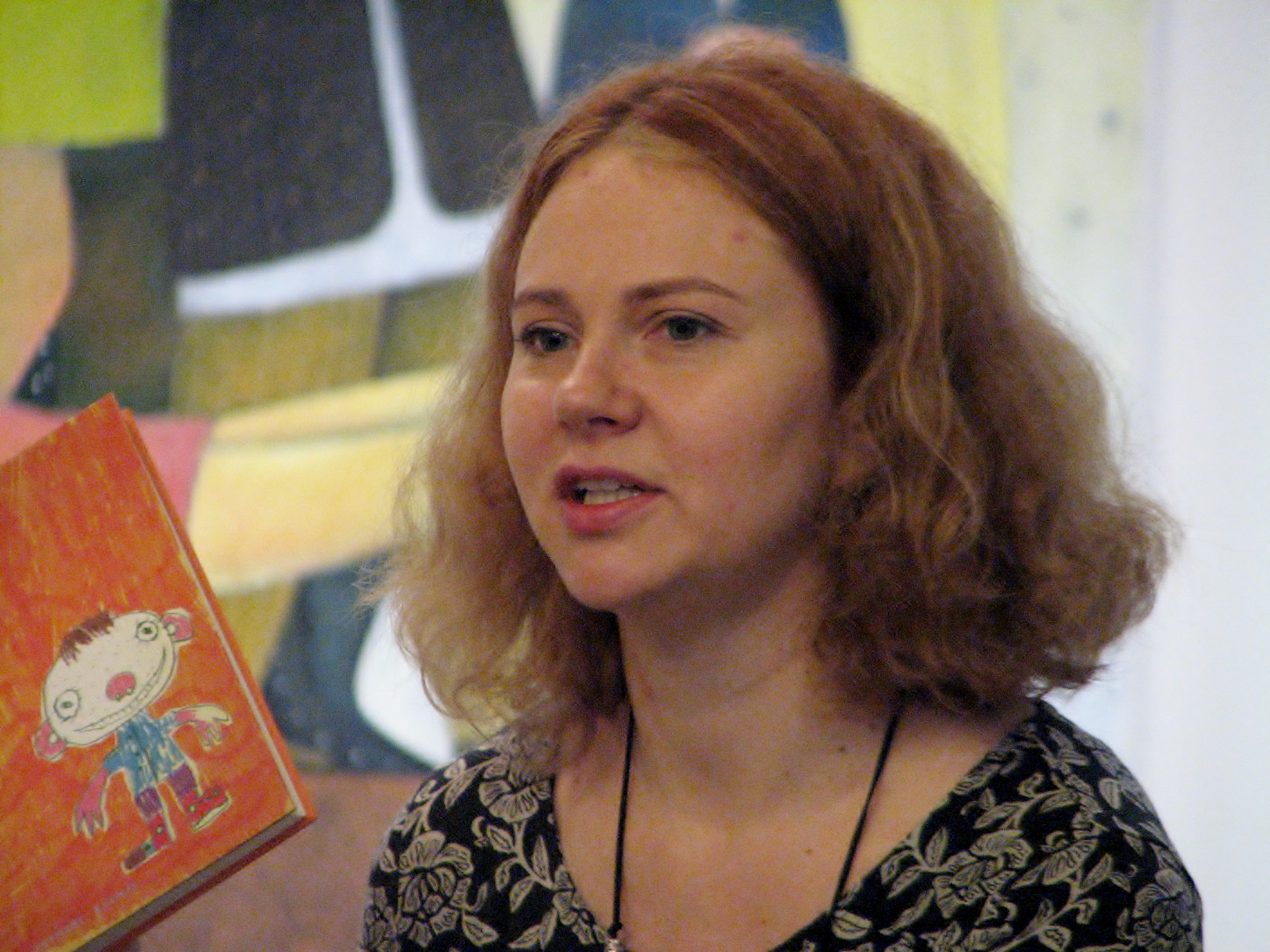 Kätlin Vainola kirjandusfestivali HeadRead raames Eesti Lastekirjanduse Keskuses tutvustamas oma raamatut "Ville"